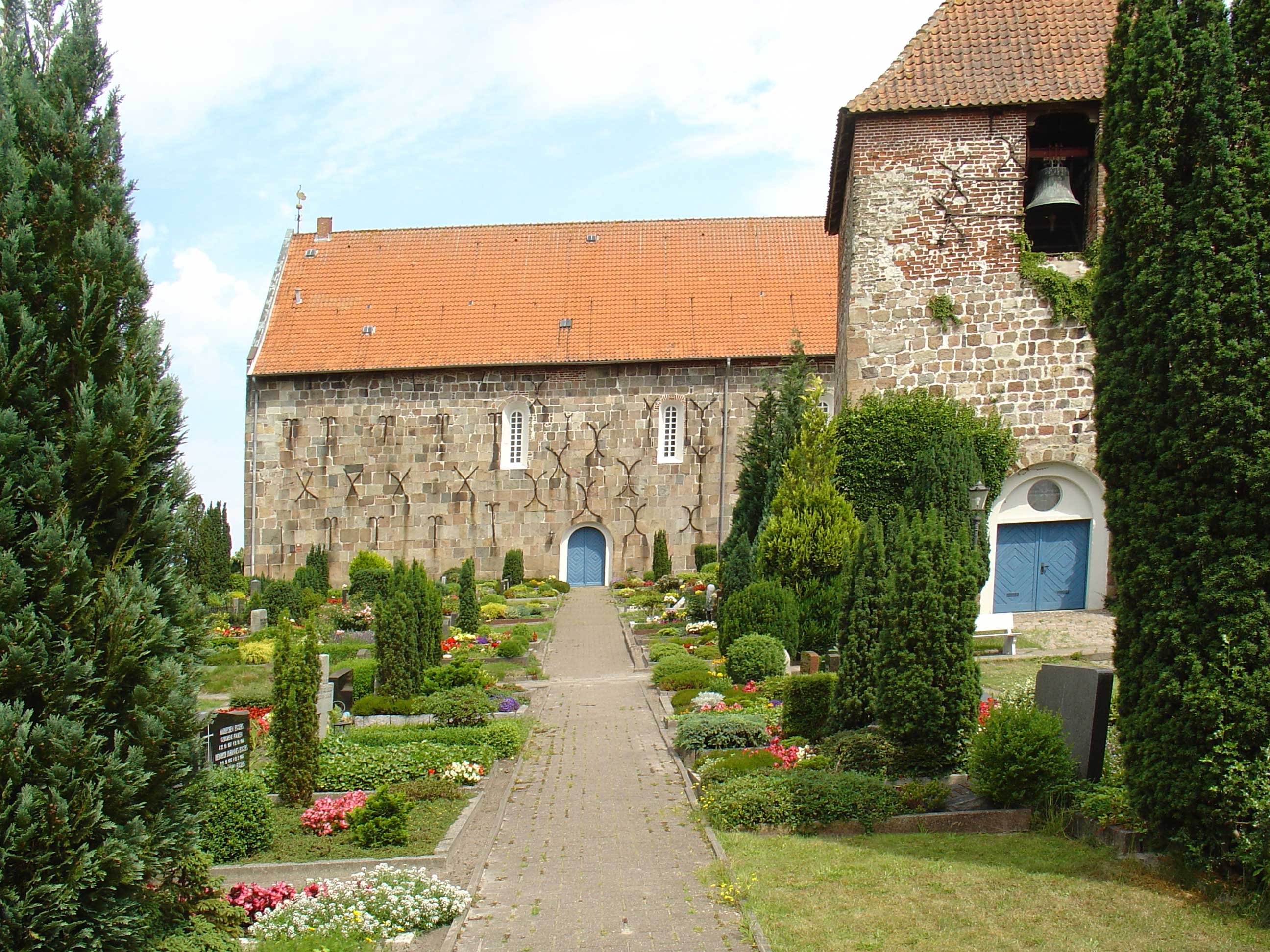 Florianuskerk Sillenstede